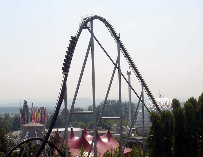 Silver Star